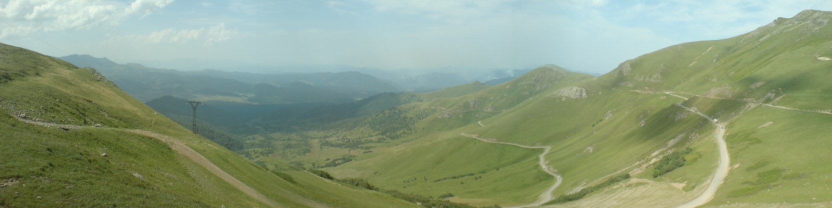 ცხრაწყარო (უღელტეხილი)